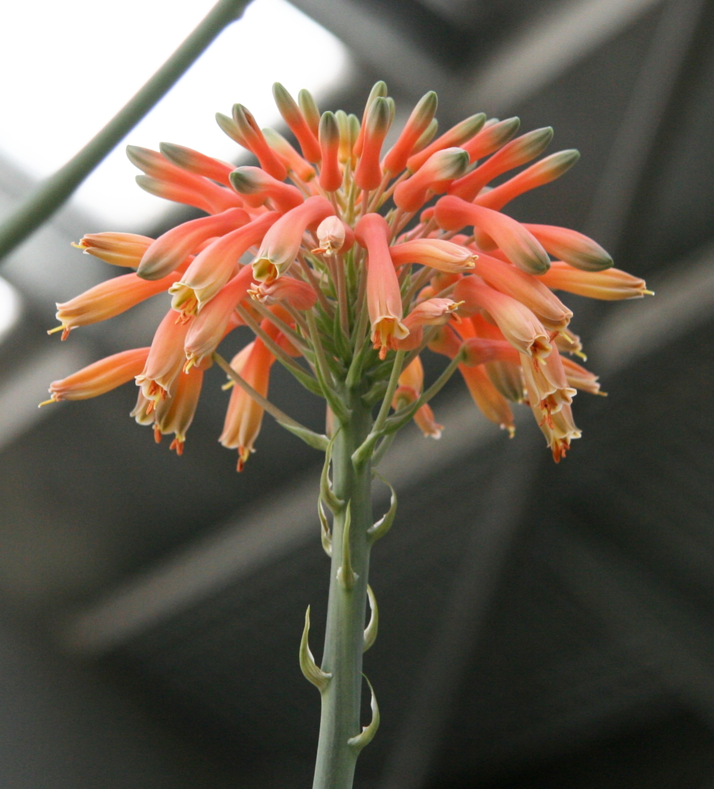 Aloe grandidentata im Botanischen Garten Bayreuth